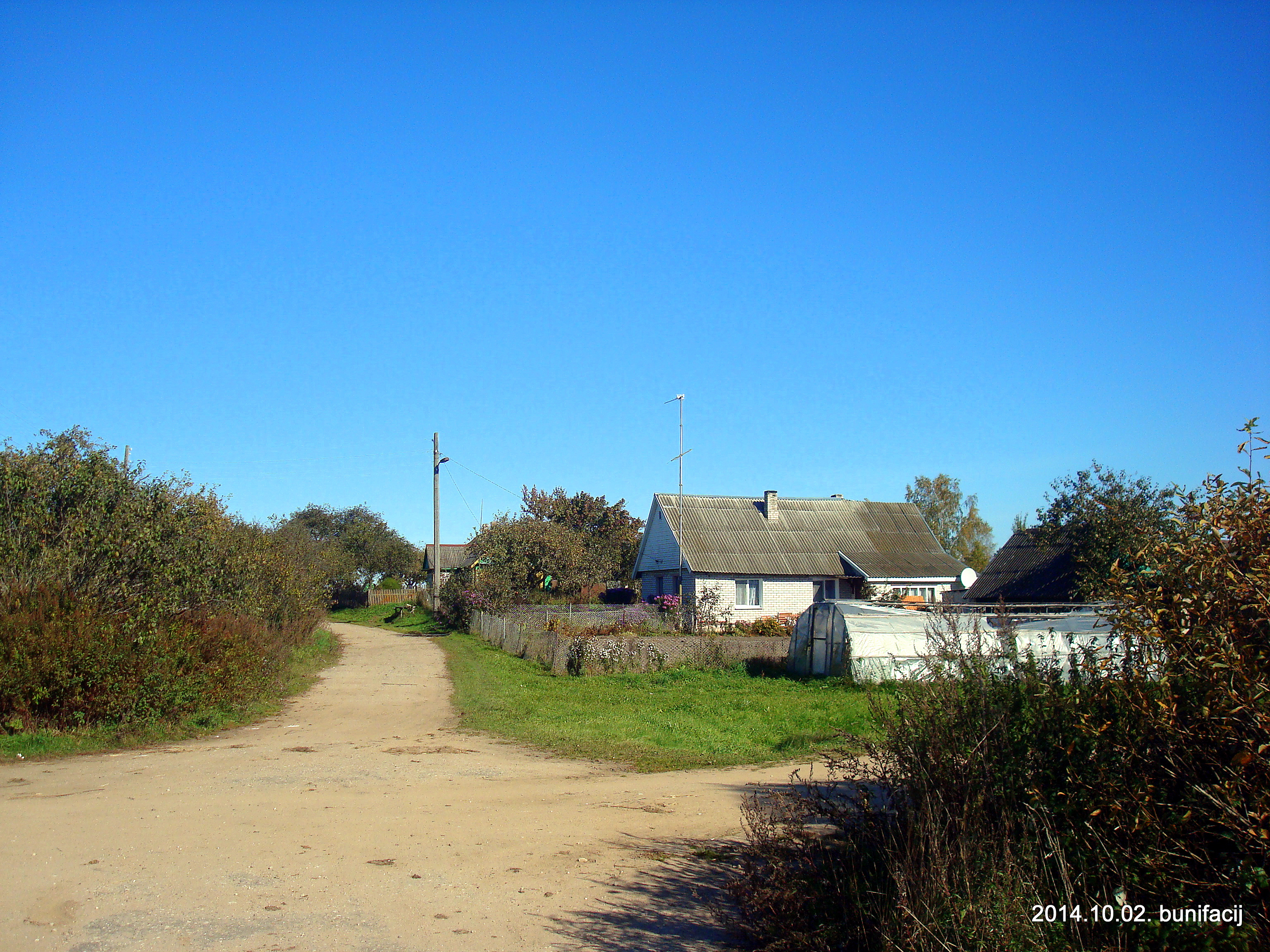 Ліпляні